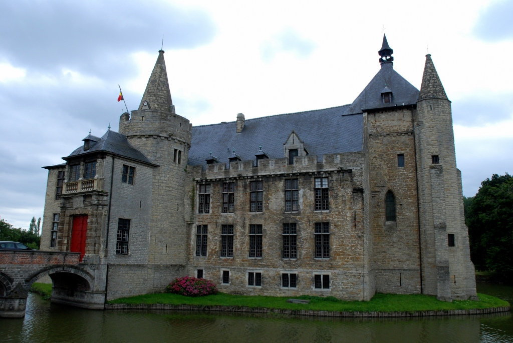 Kasteel van Laarne (België)